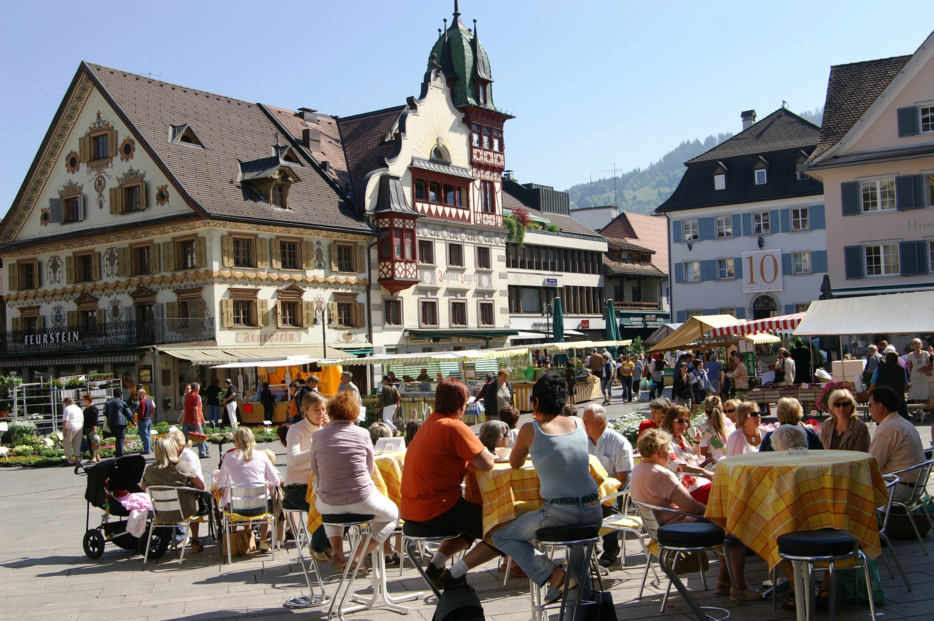 Dornbirn Marktplatz Kaffee Steinhauser + Feuersteinhaus